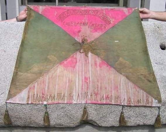 Знамето на четата на Тане Николов